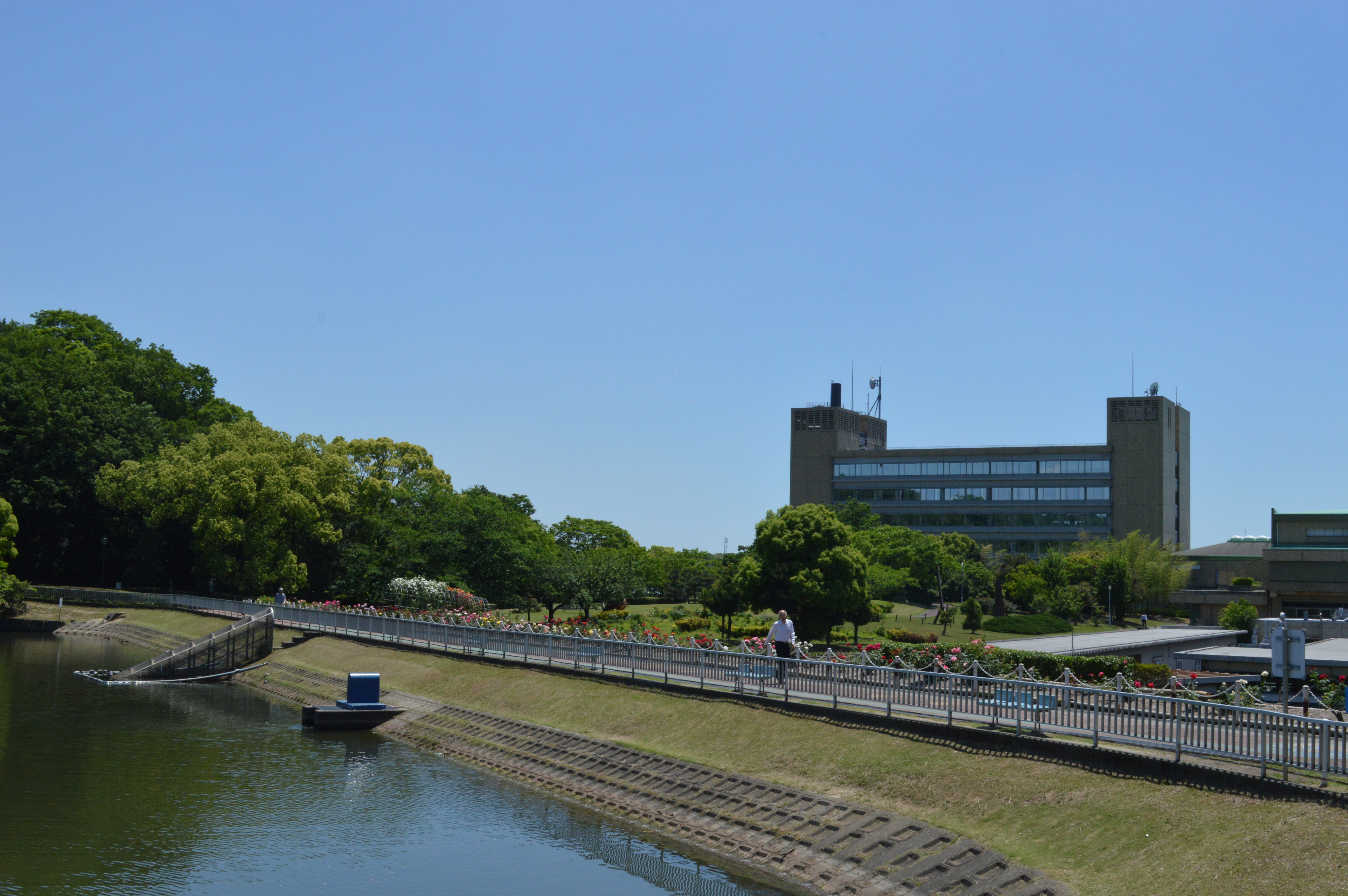 愛知県東海市の大池公園（手前）と東海市役所。